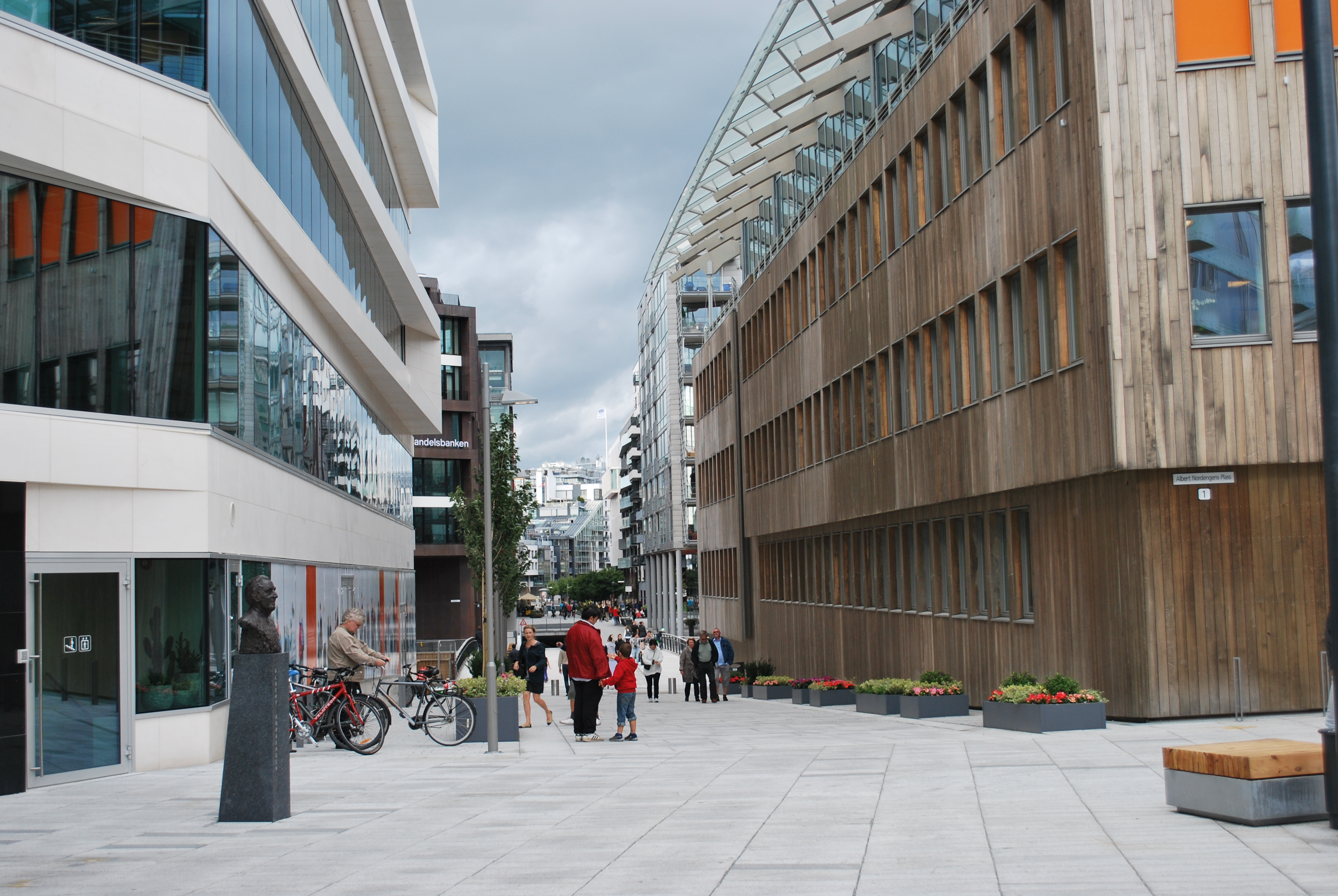 Tjuvholmen allé sett nordover fra Albert Nordengens plass, Tjuvholmen, Oslo